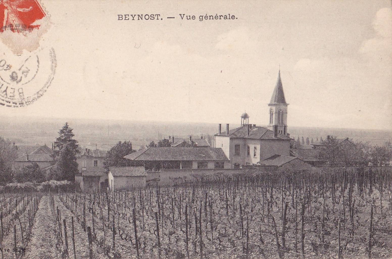 Carte postale de Beynost (années 1910) : vignes au premier plan ; on aperçoit la seconde église Saint-Julien et la mairie. L'emplacement de la prise de vue se situe dans l'actuel lotissement du Coteau.